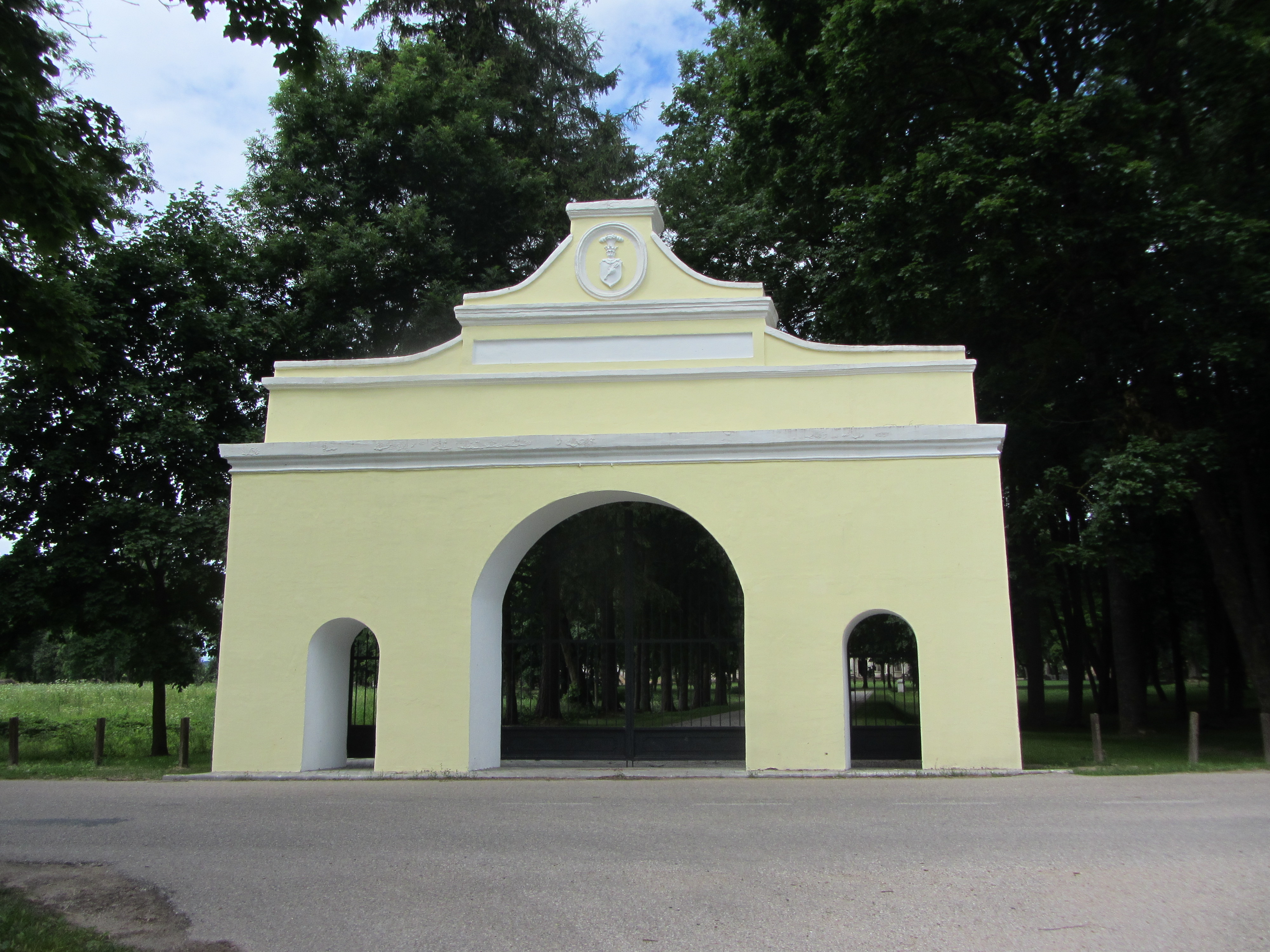 Bartkuškis 19159, Lithuania